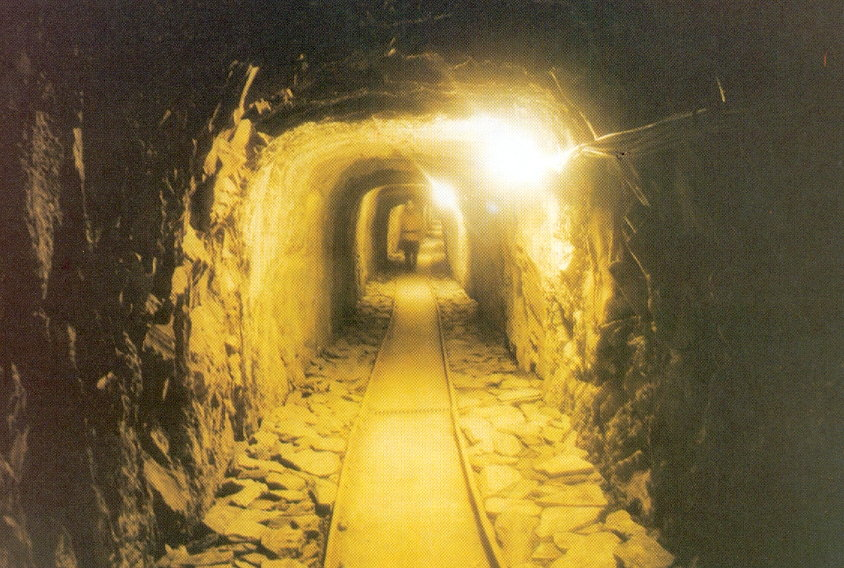 Besucherbergwerk Fell - Grube Hoffnung